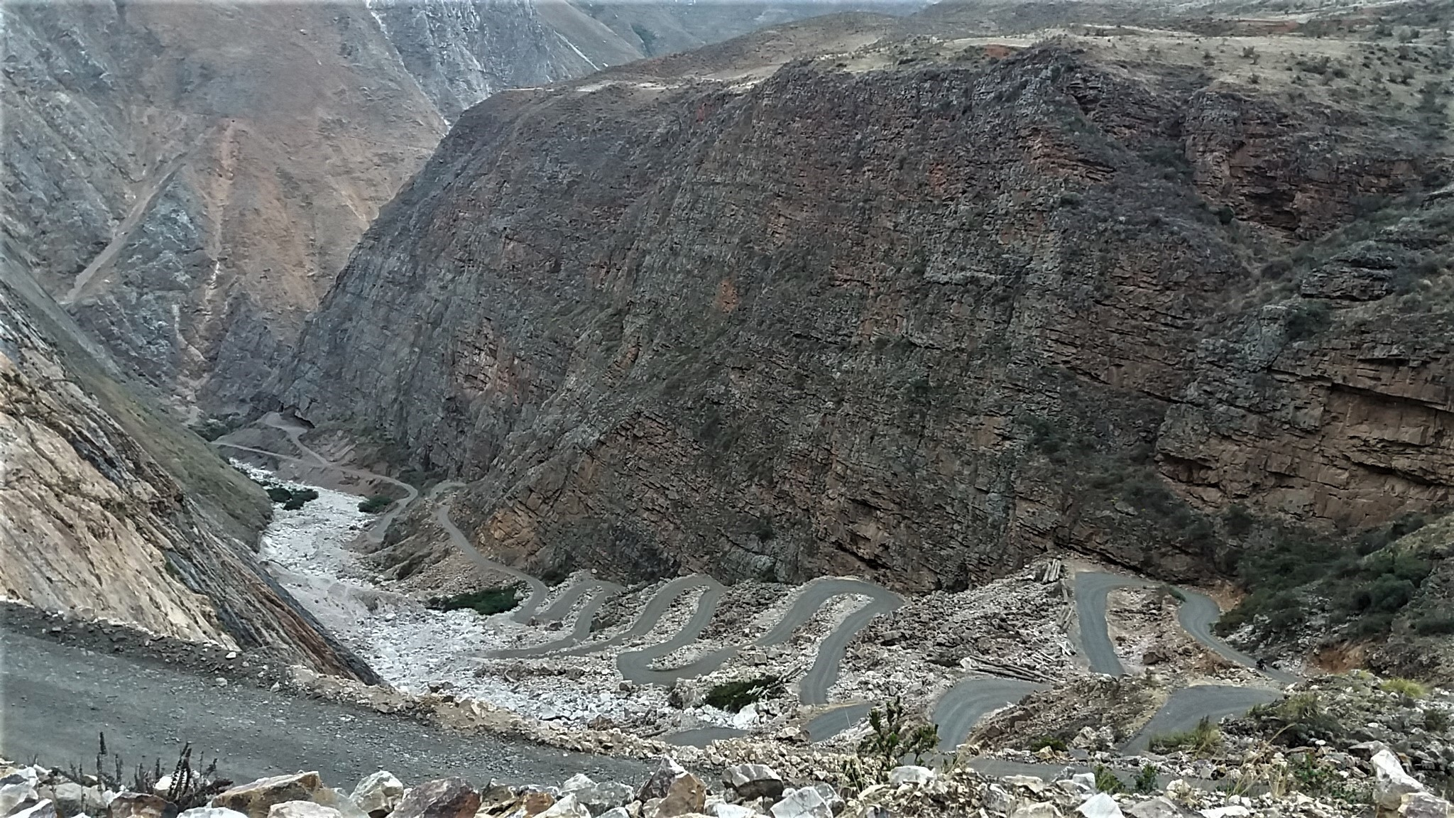 Entre Mellizo y Monserrate la trocha carrozable AN-109 discurre sobre el mismo cauce del río Allma y por eso se bloquea y derrumba periódicamente en épocas de lluvia.